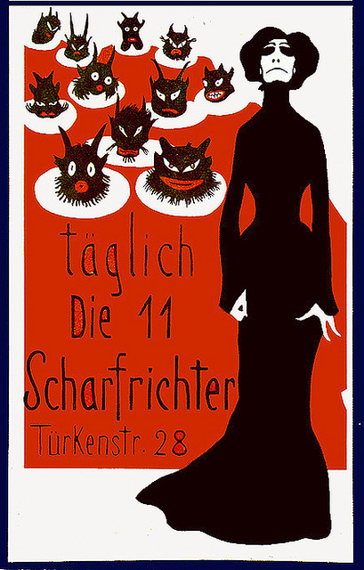 Kabaré plakát 1901-ból: Die 11 Scharfrichter